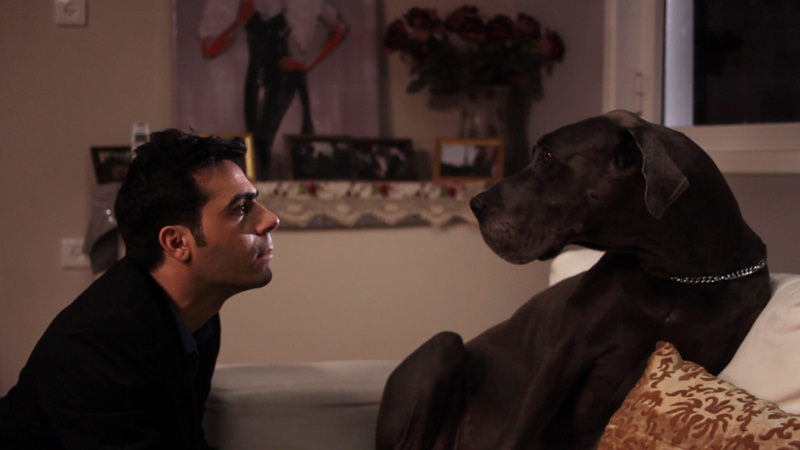 דוד שאדי והכלבה פיונה בסרט ג'נטל דוג